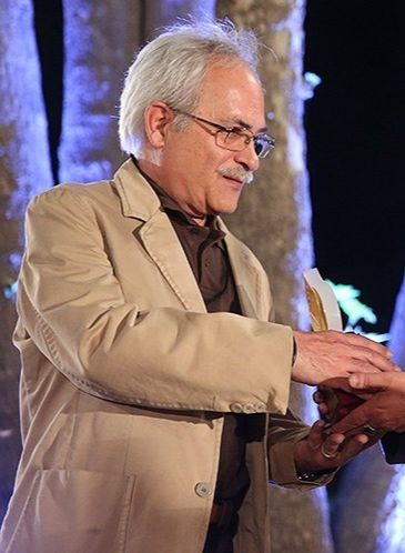 کامران قدکچیان - اردیبهشت ۱۳۹۳